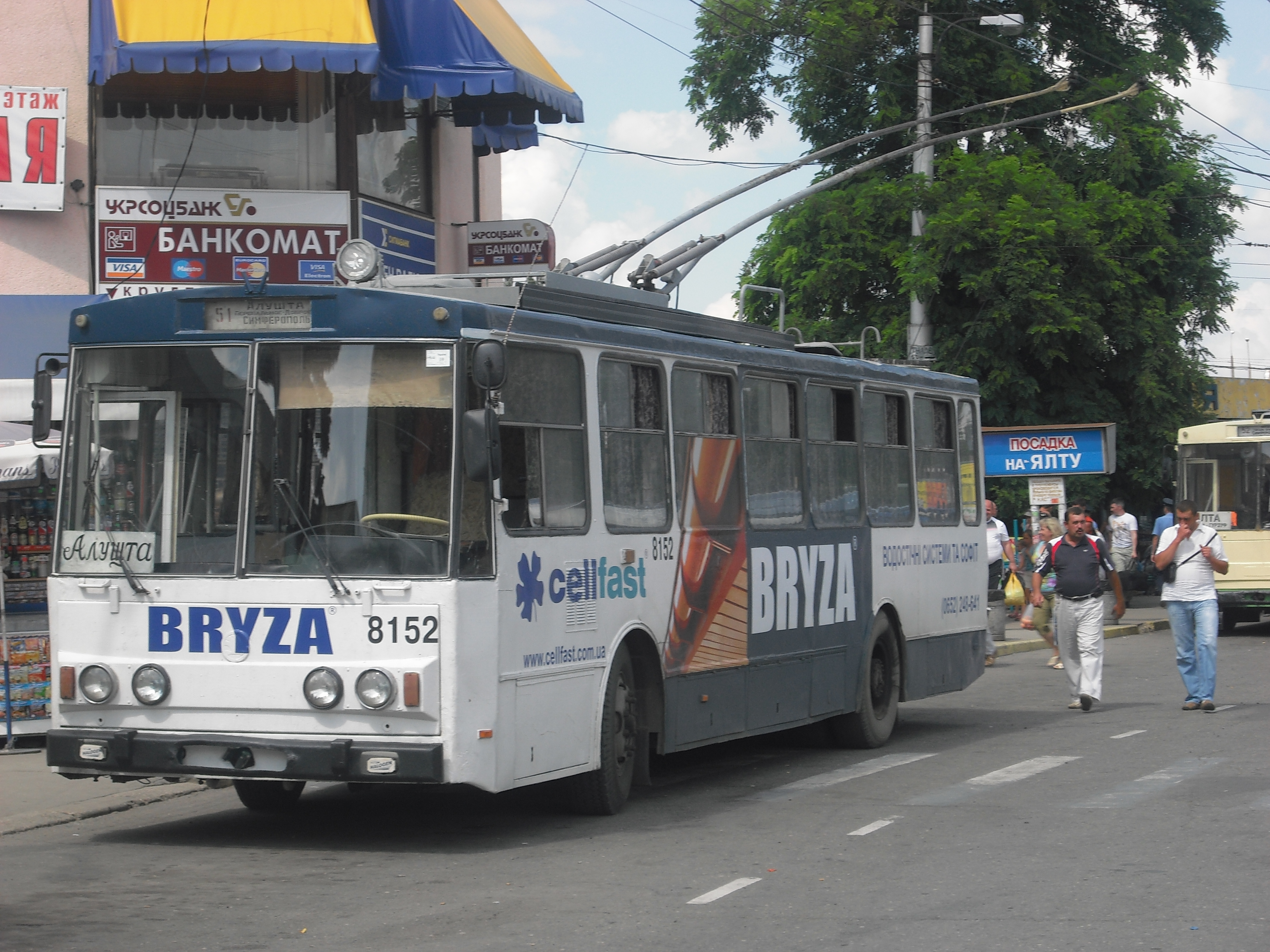 Троллейбус Шкода 14Тр в Симферополе